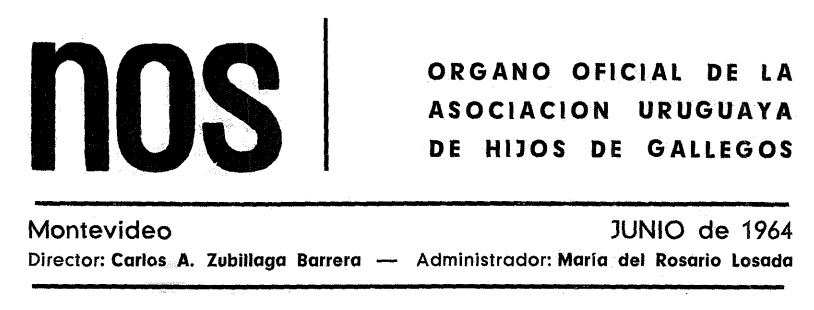 Nós: Órgano Oficial de la Asociación Uruguaya de Hijos de Gallegos